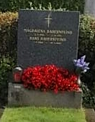 Johann Bauernfeind-Baumgartner Friedhof (B-8-42)